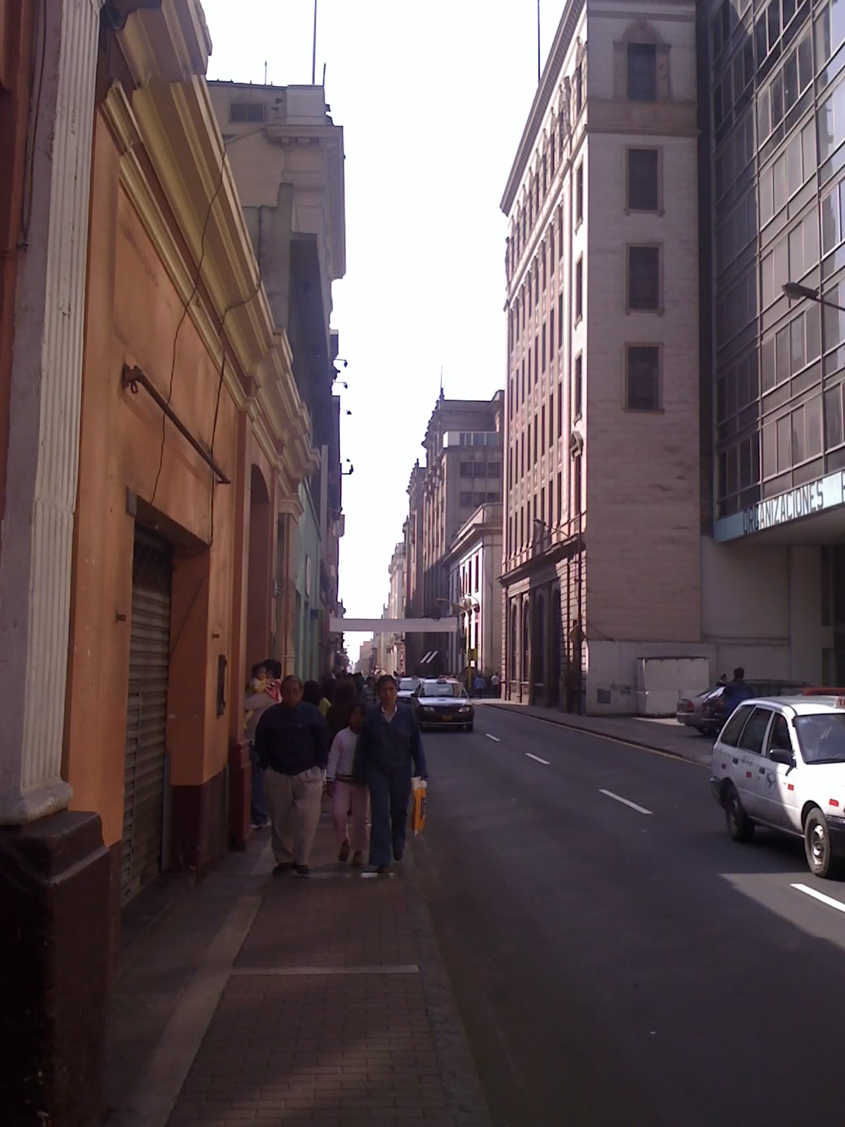 Vista de este a oeste de la cuadra tres del jirón Miroquesada en el centro de Lima, Perú